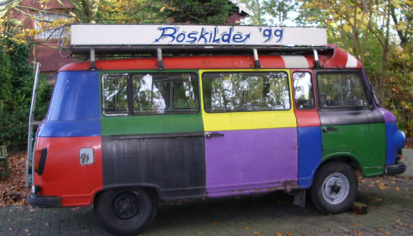 Barkas-Bus eines treuen Festivalbesuchers